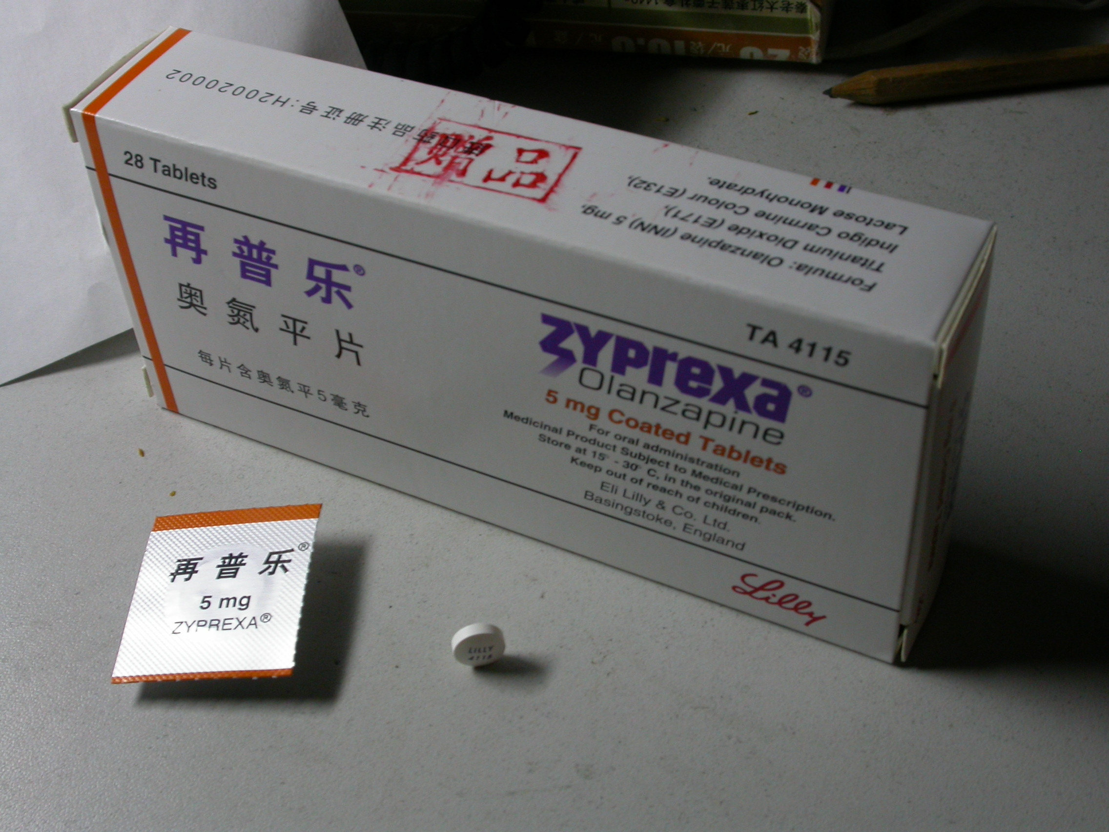 再普乐外观，自己拍摄，本图片不允许百度百科使用。